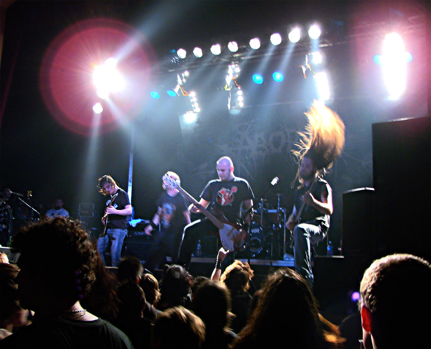 Aborted au Coolness'tival 2007, le 3/11/07 à Montdidier (60).